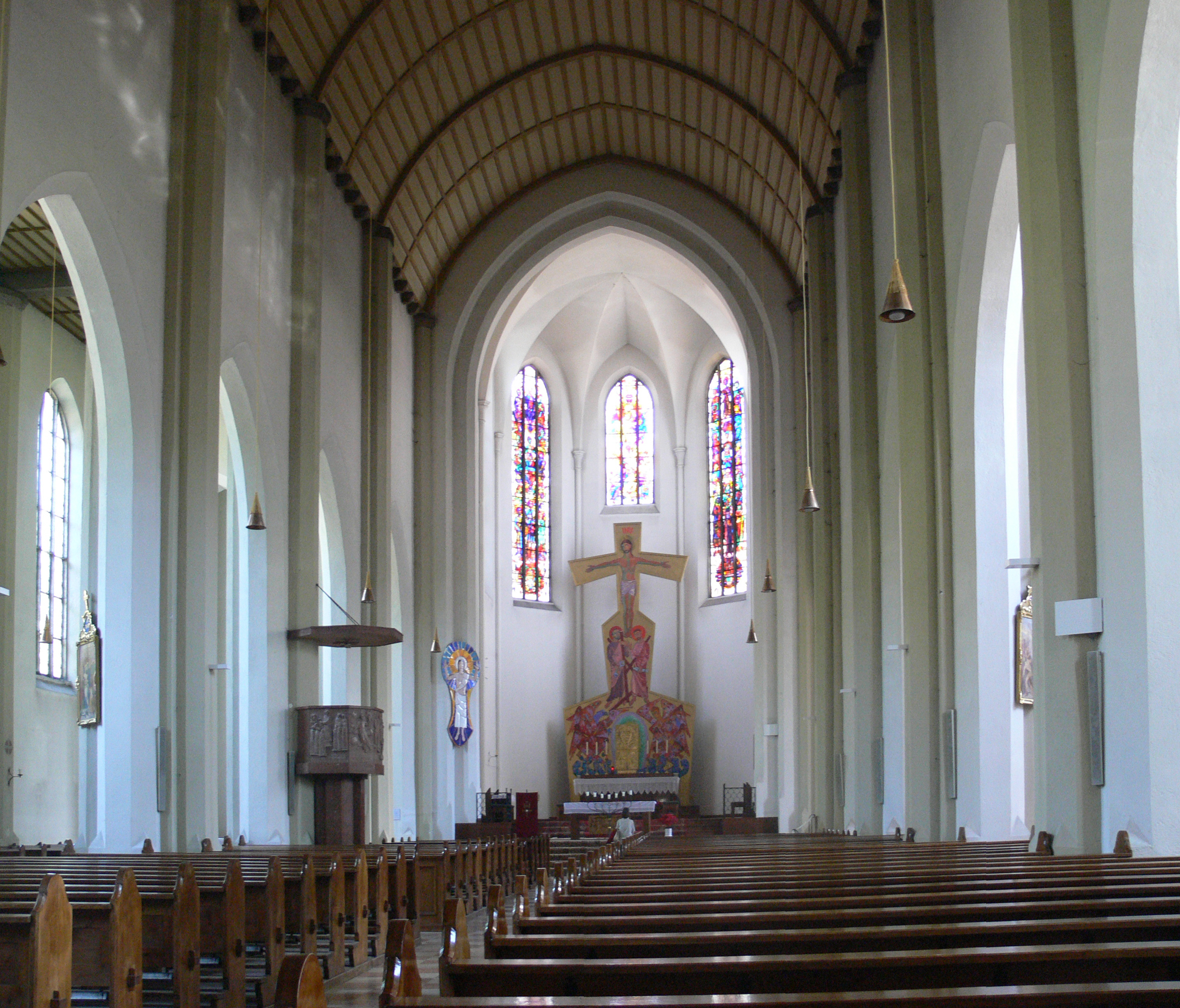 Salzburg, Andräkirche Blick in Richtung Chor